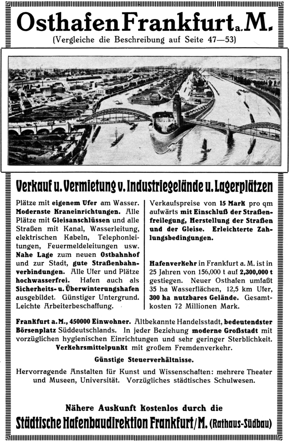 Werbeanzeige der Stadt Frankfurt am Main für den Frankfurter Osthafen